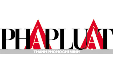 logo báo Pháp Luật TP.HCM